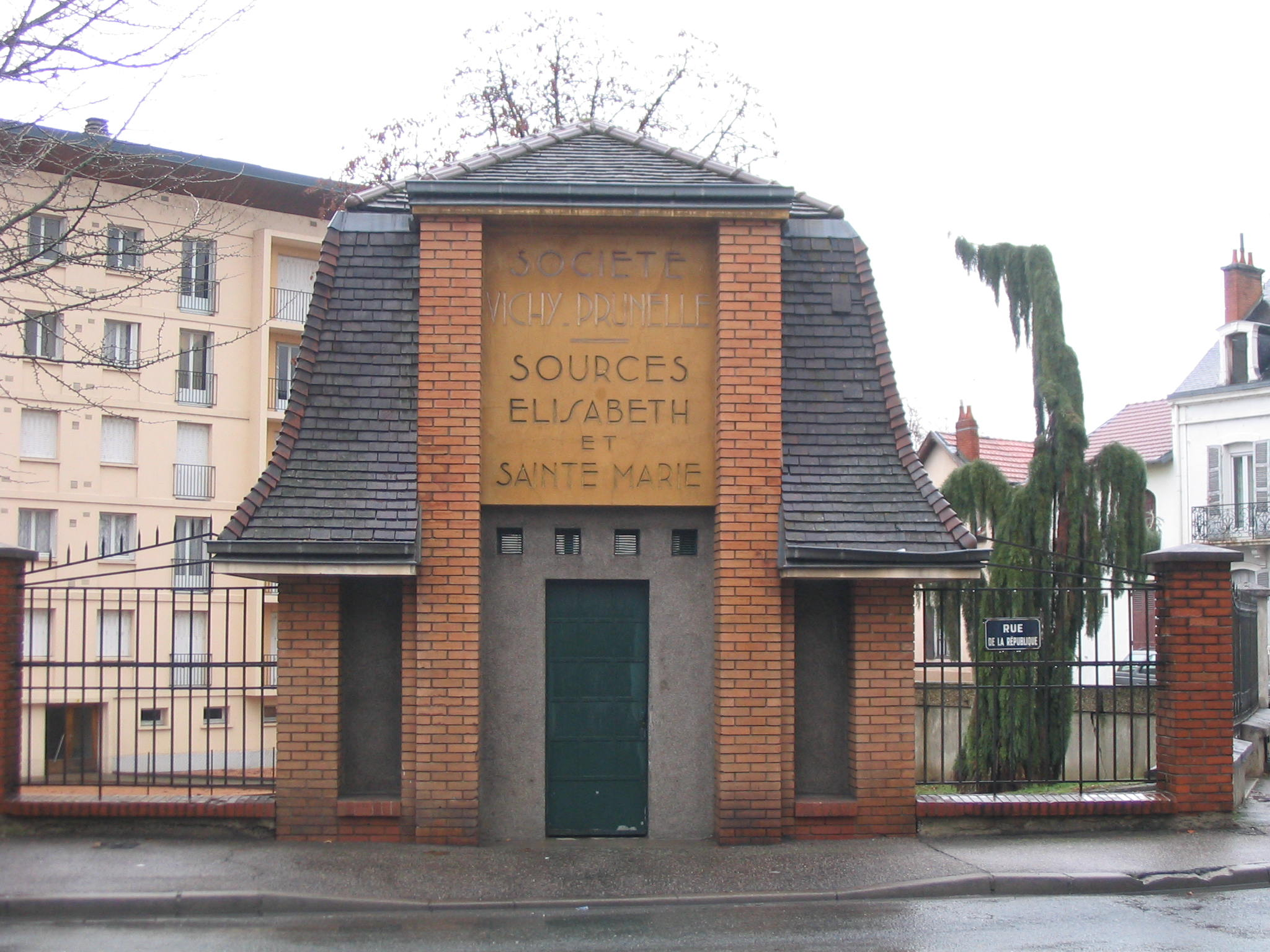 Les sources Elisabeth et Sainte Marie à Cusset, rue de la République.